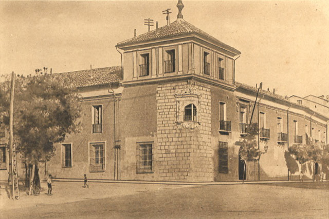 Palacio de Pimentel. Exterior - Valladolid - Heliotipia Artística Española. Recuerdos Artísticos e Históricos de la Provincia. Fotos Gilardi. Fachada de la Diputación. Casa donde nació el Rey Felipe II. Hoy Diputación Provincial. - Impresión. Papel 170 x 115 Sepia